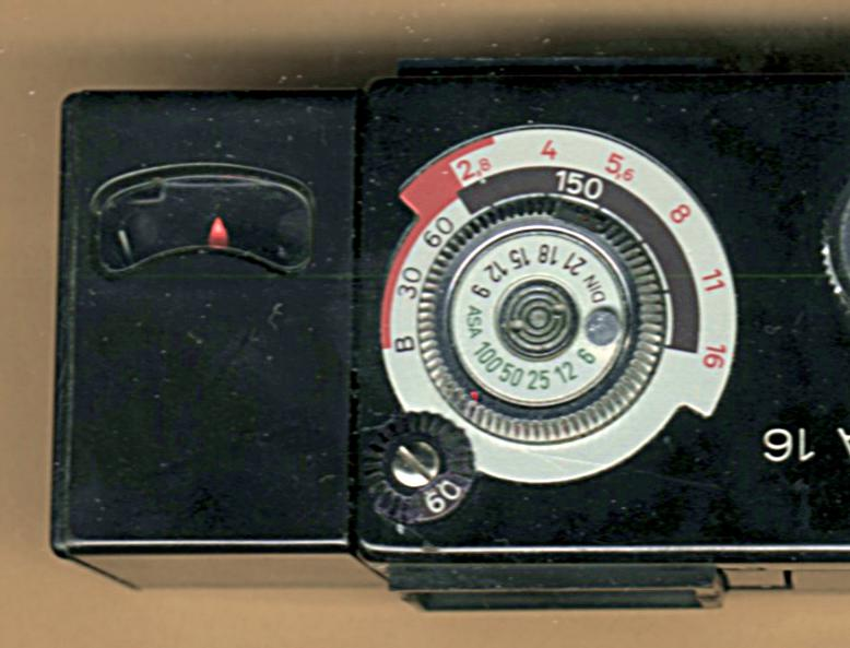 posemètre de l'Edixa 16